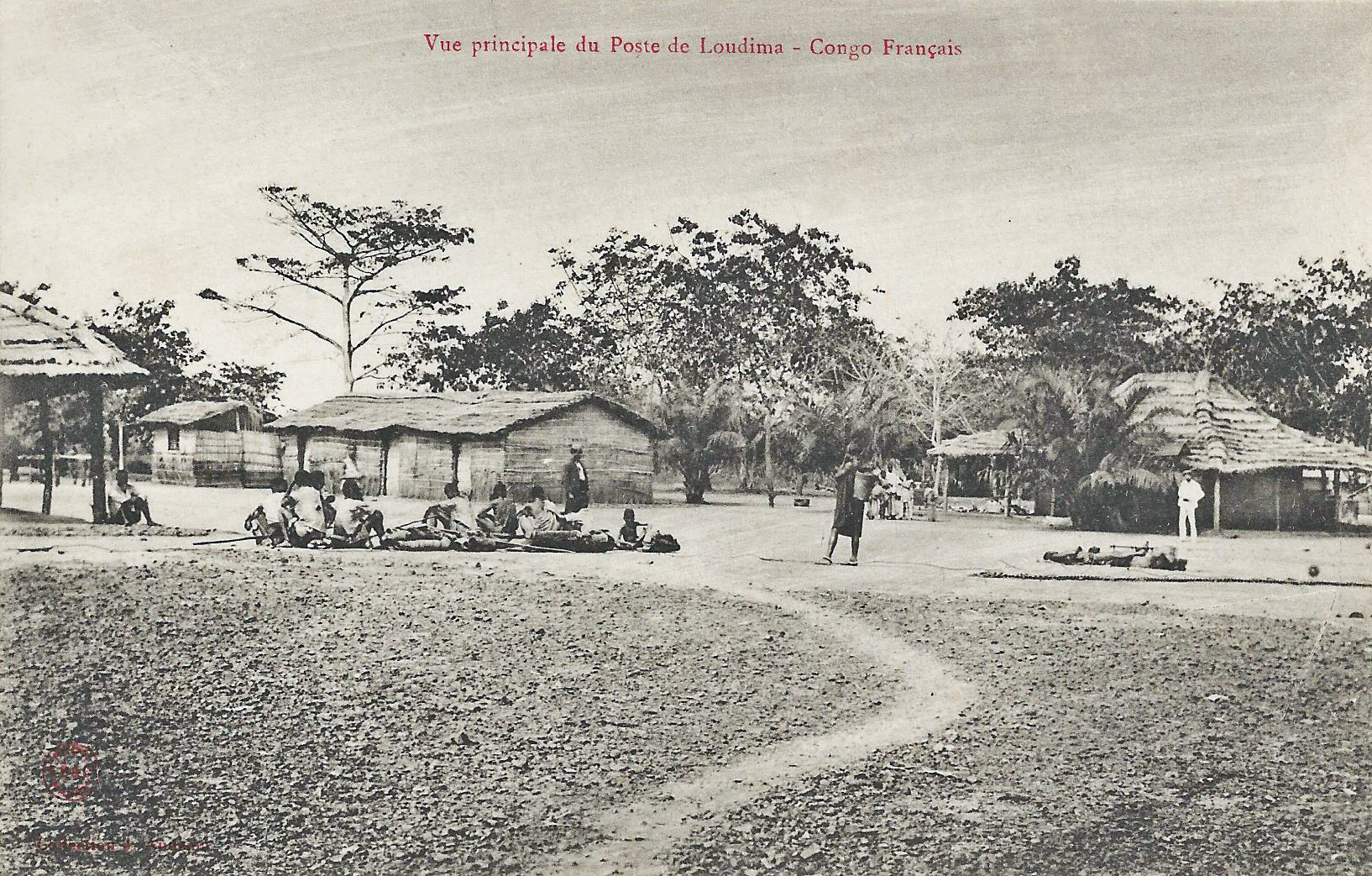 Vue principale du poste de Loudima.. Collection J. Audema. Phot. A.B. & Cie, Nancy [Albert Bergeret] Congo Français